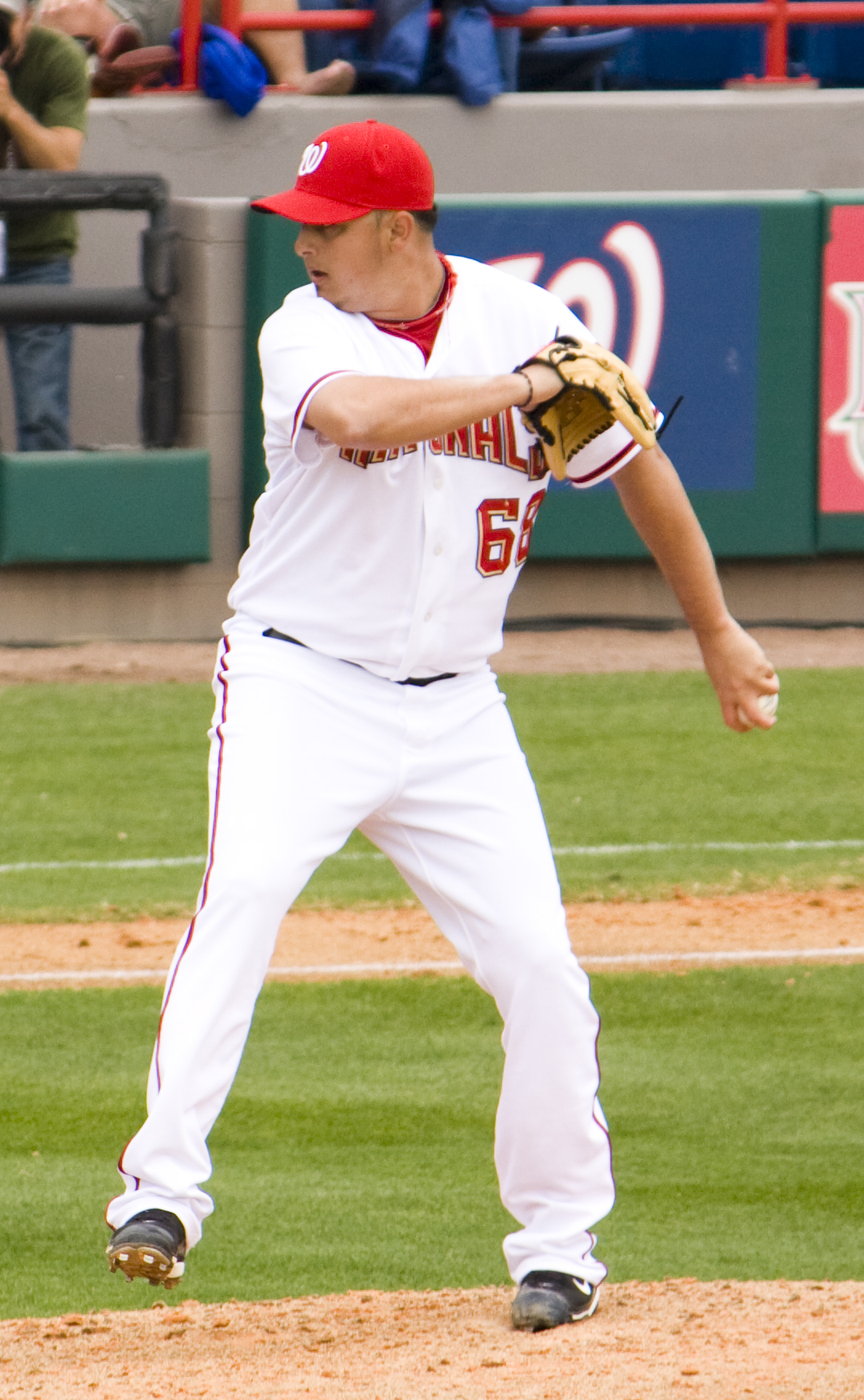 Víctor Gárate